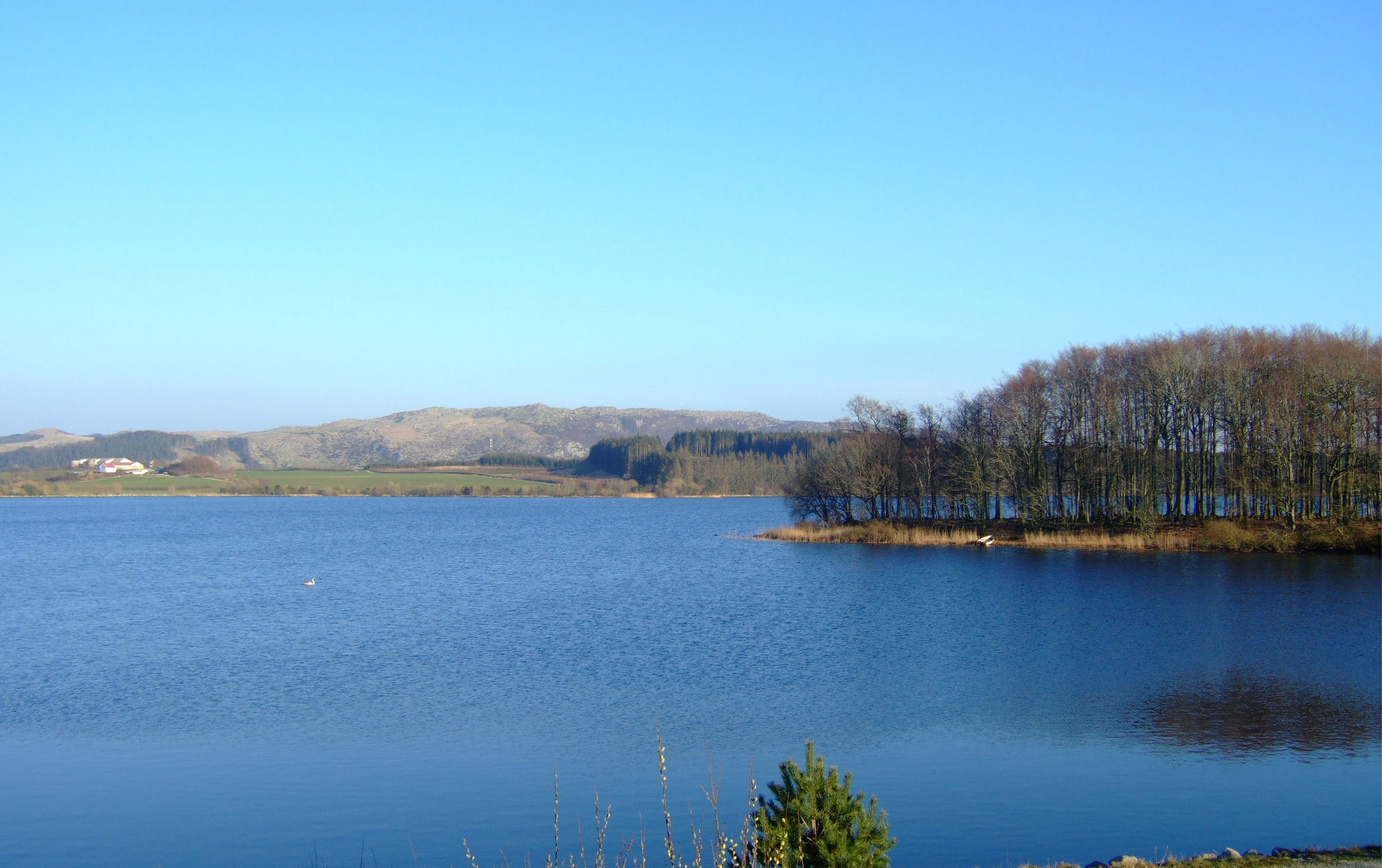 Frøylandsvannet, Klepp, Rogaland